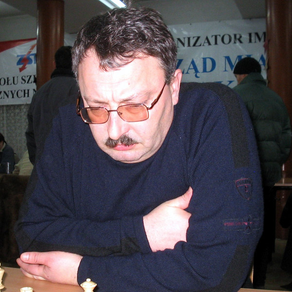 GM Vladimir Malaniuk, Cracow 2006